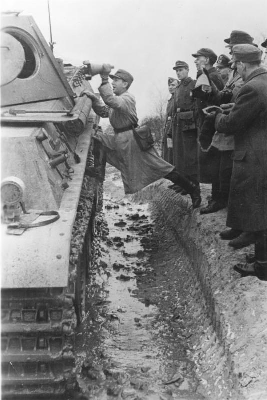 Der Volkssturm steht bereit. Ein "Panther", eine der schweren deutschen Panzer-Typen, rollt über den Truppenübungsplatz. An diesem "lebenden Modell" üben die Volkssturmsoldaten den Einsatz der Panzernahbekämpfungsmittel. Foto: SS-PK-Feder/TO-EP (Schu), 11.1.1945 [Herausgabedatum] PK